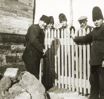 Bessarabiendeutsche Männer mit typischer Kopfbedeckung Pudelmütze